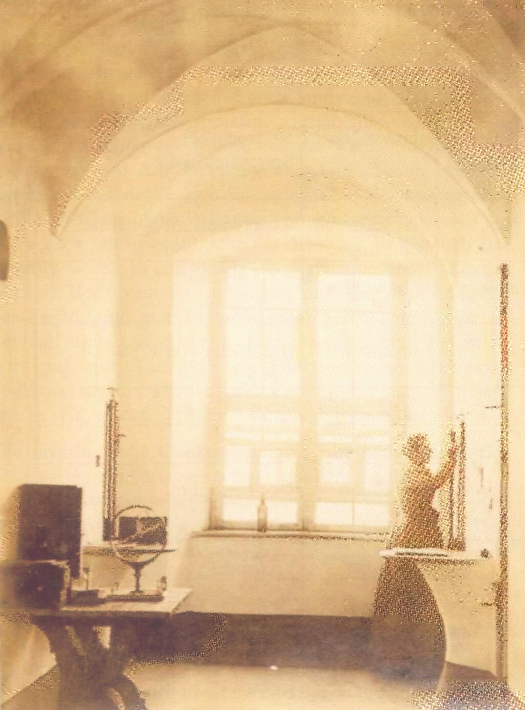 Beobachtungsraum